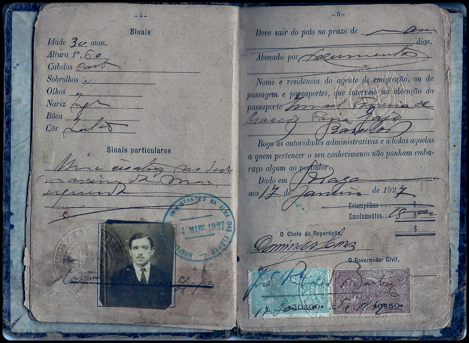 Passaporte de um imigrante português da região do Minho, Concelho de Esposende, Distrito de Braga.